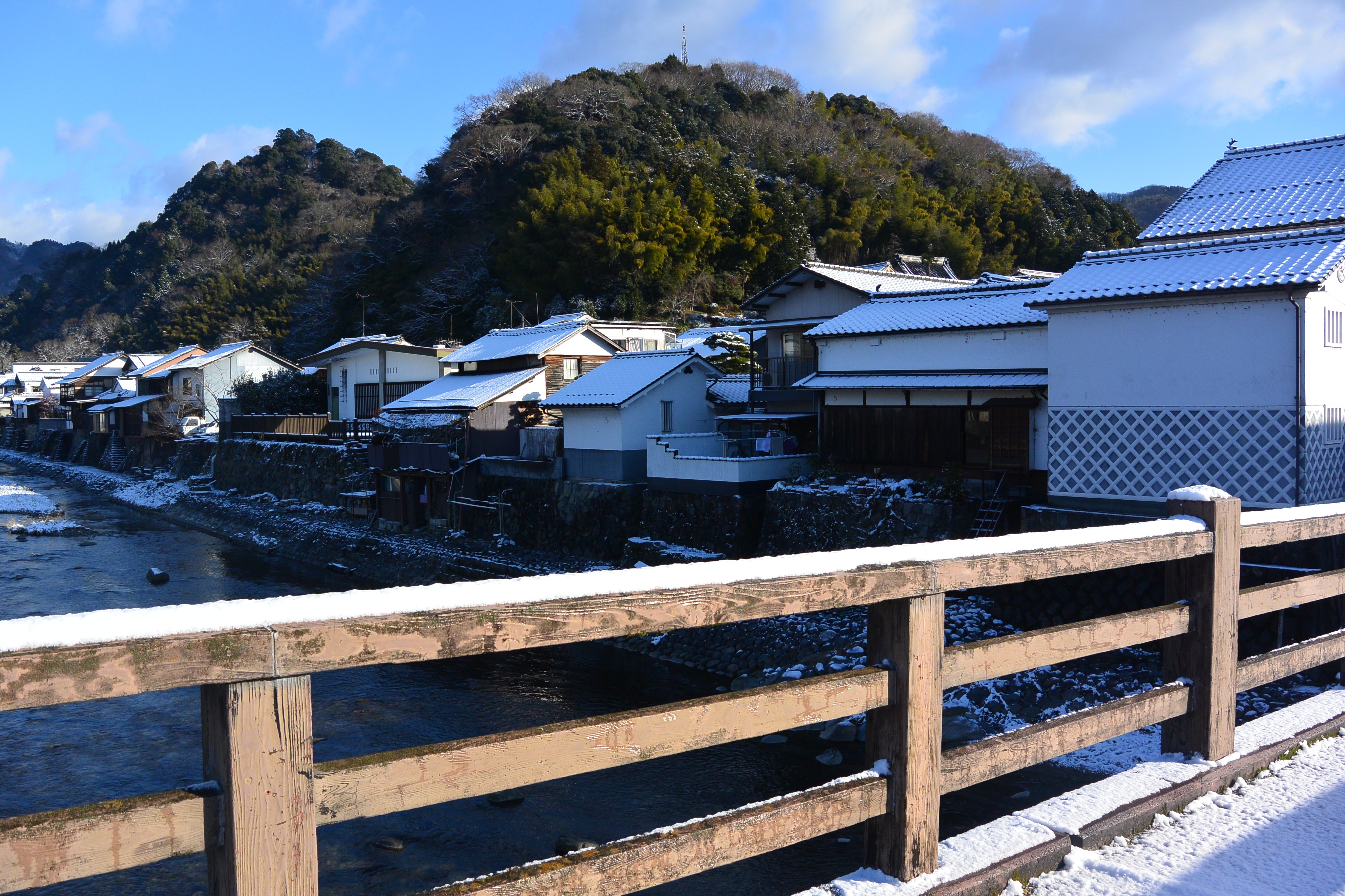 旭川にかかる中橋から見た勝山の街、岡山県真庭市 Nikon 1 AW1 + 1 Nikkor AW 11-27.5mm f/3.5-5.6